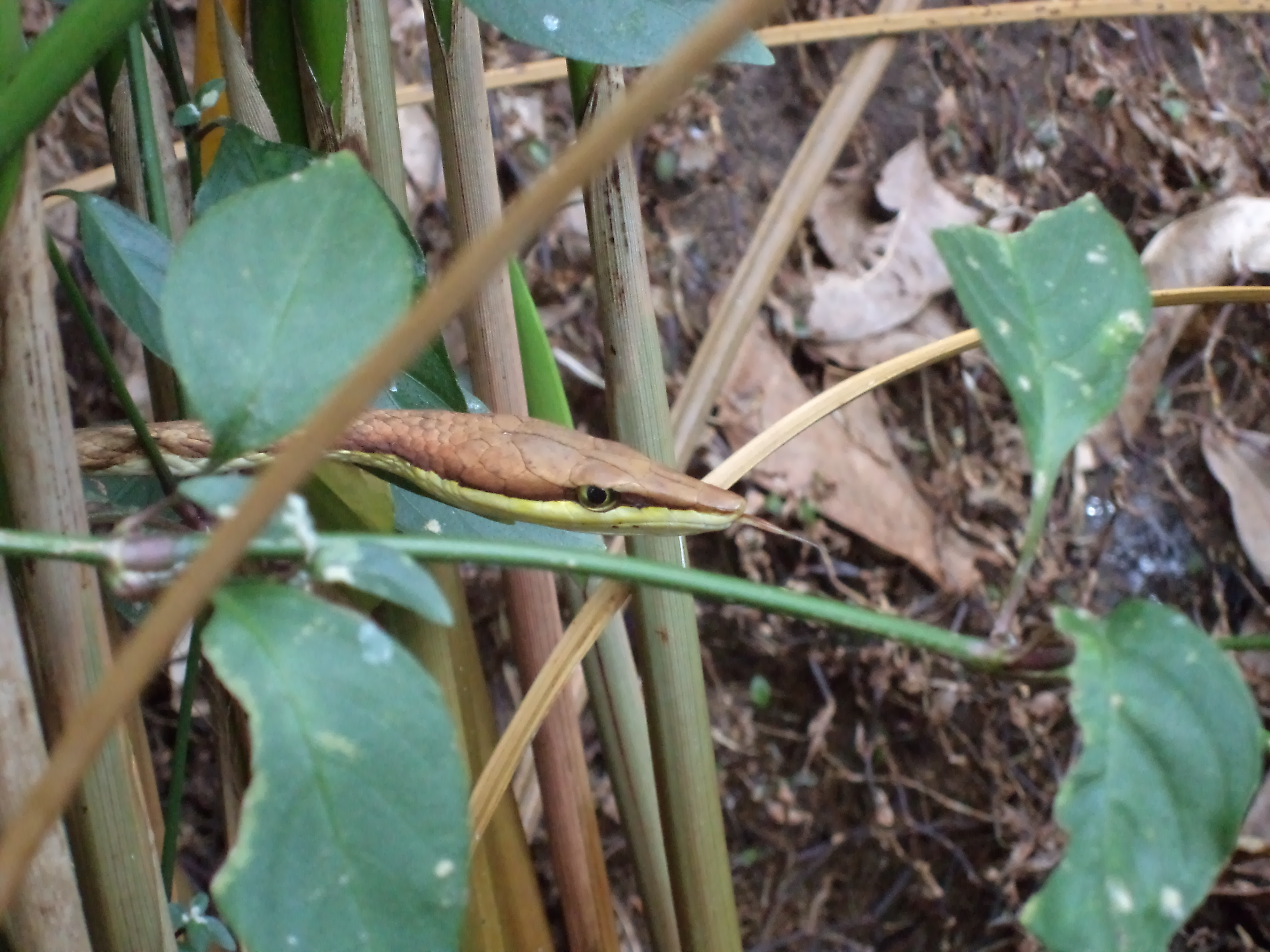 Oxybelis ¿aeneus? Culebra bejuquilla, en isla de Ometepe.